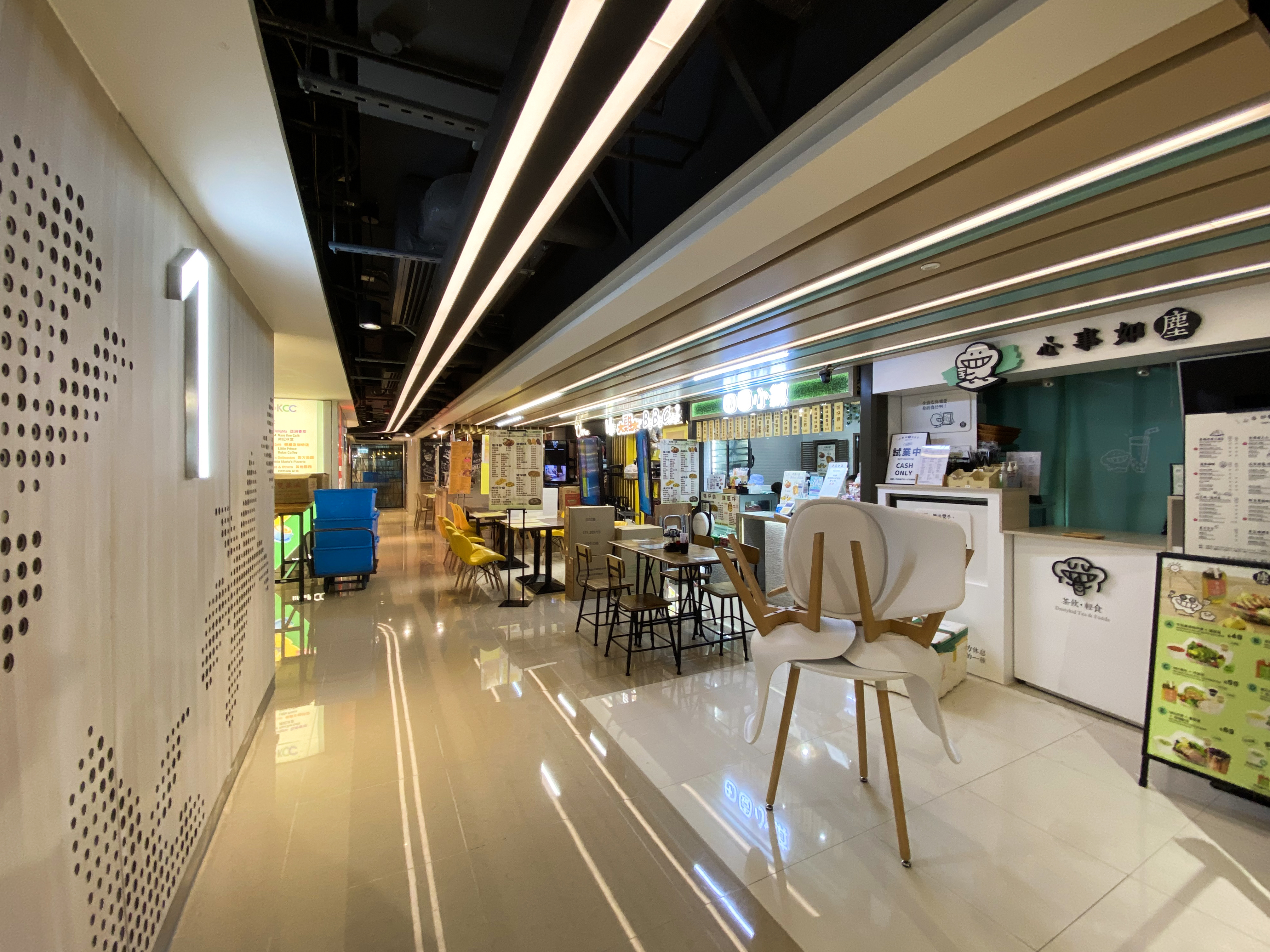 Life@KCC Level 1